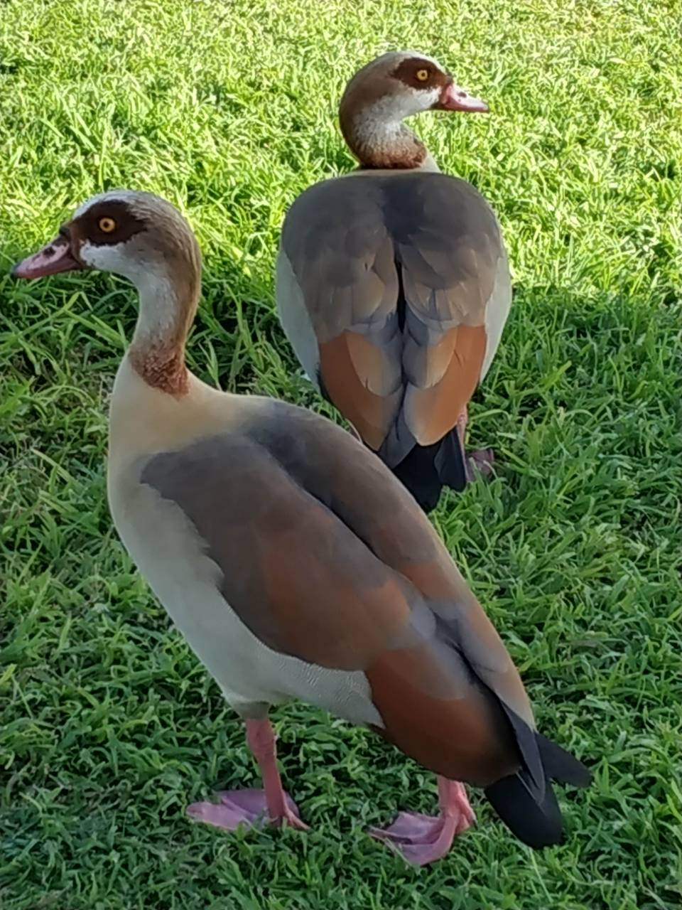 Пара нильских (египетских) гусей (лат. Alopochen aegyptiacus) в Израиле (Рамат-Ган)